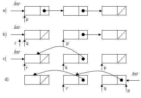 Inverzija liste